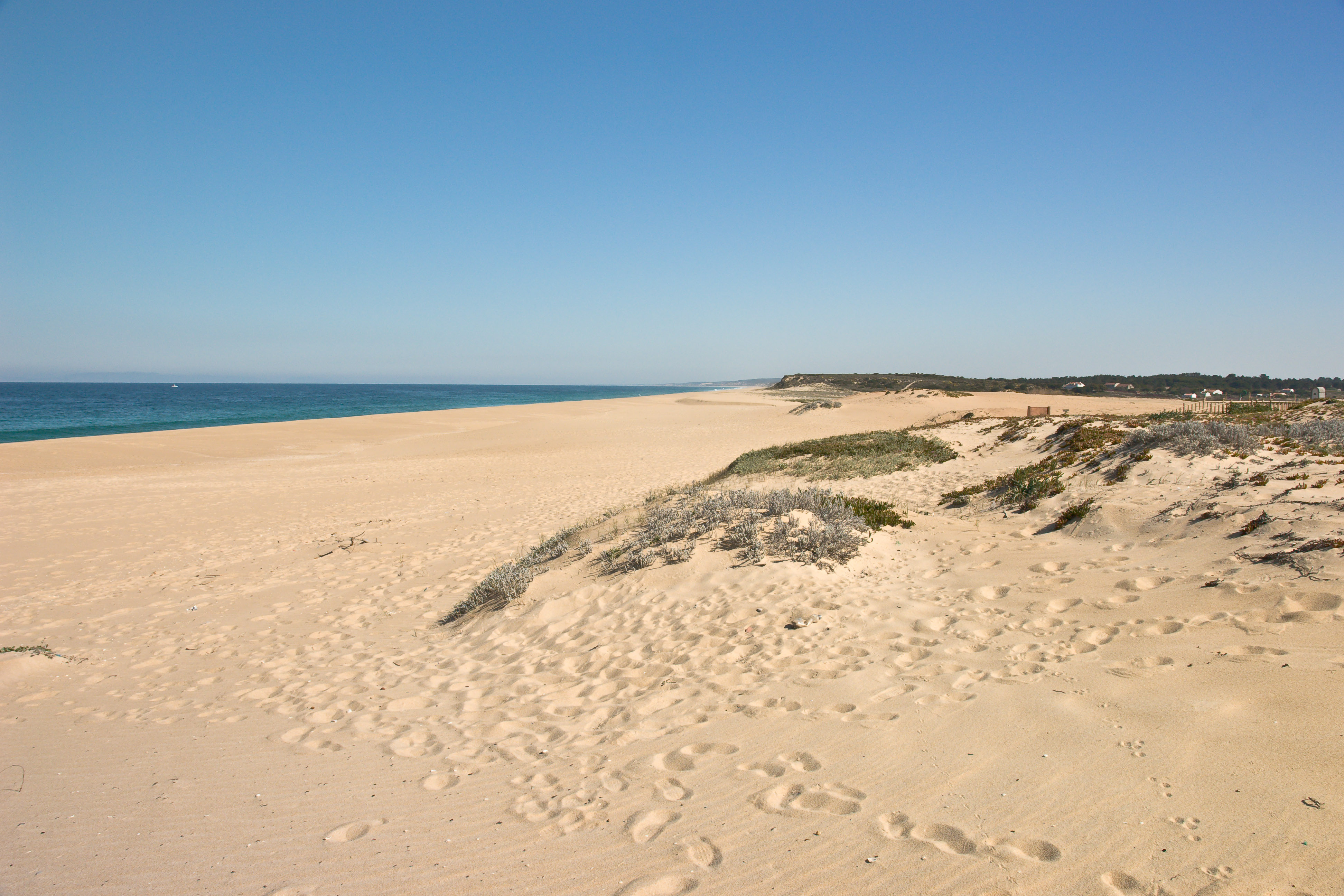 Strandabschnitt beim Zugang Melides